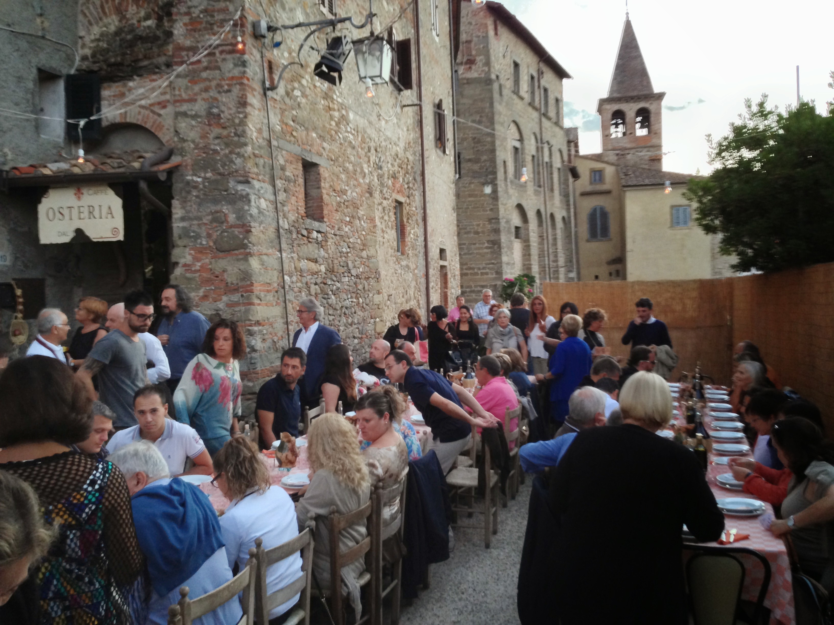 Tovaglia a quadri, tavolata edizione 2014